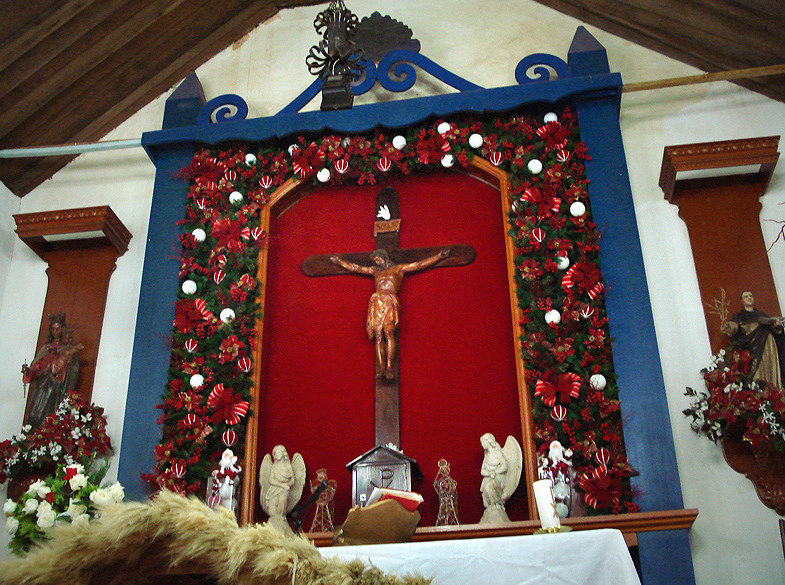 Altar-mor da Igreja de São Domingos, Torres, Brasil, decorado para o Natal.